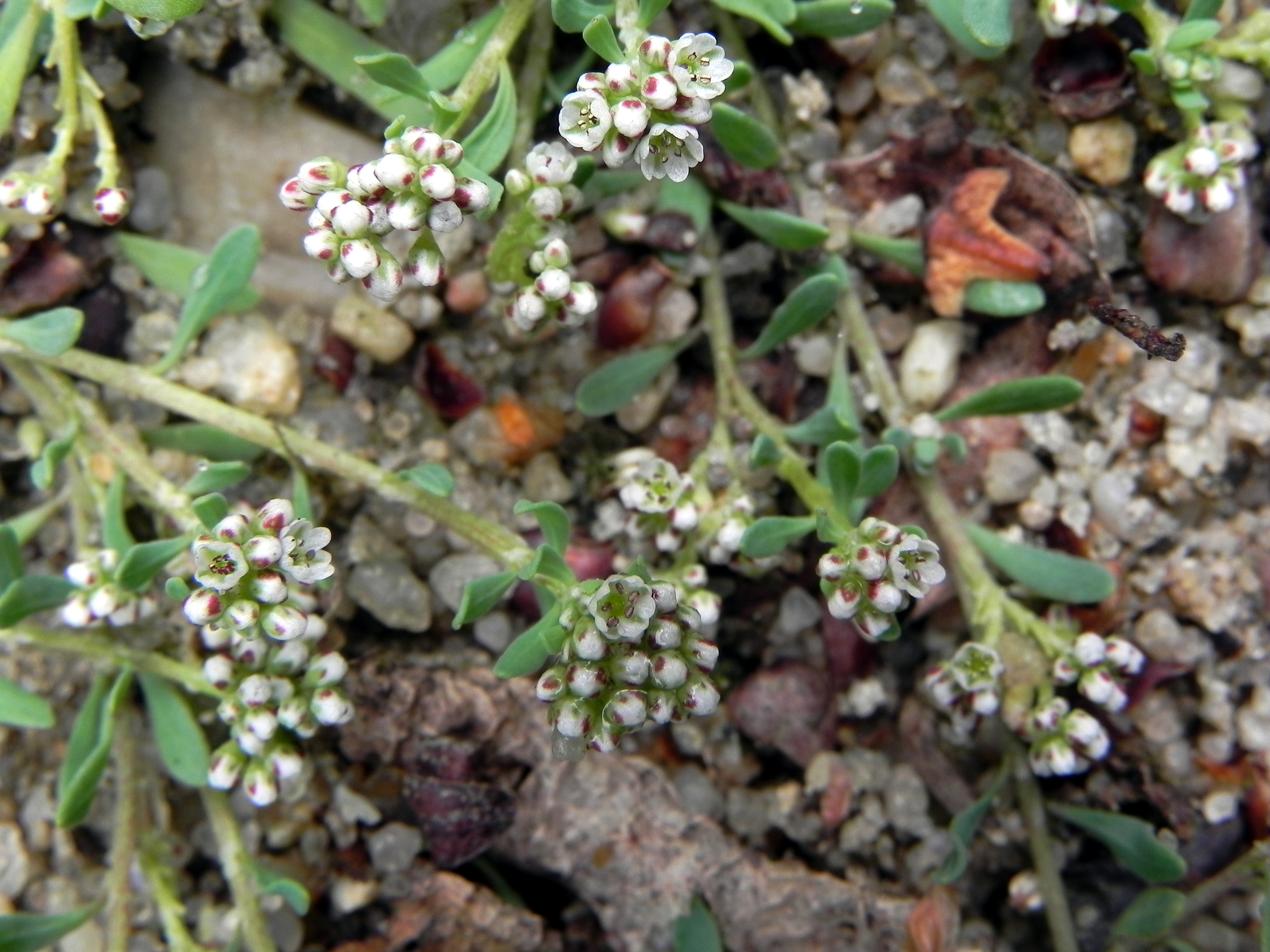 Hirschsprung (Corrigiola litoralis), Südheide (Germany)